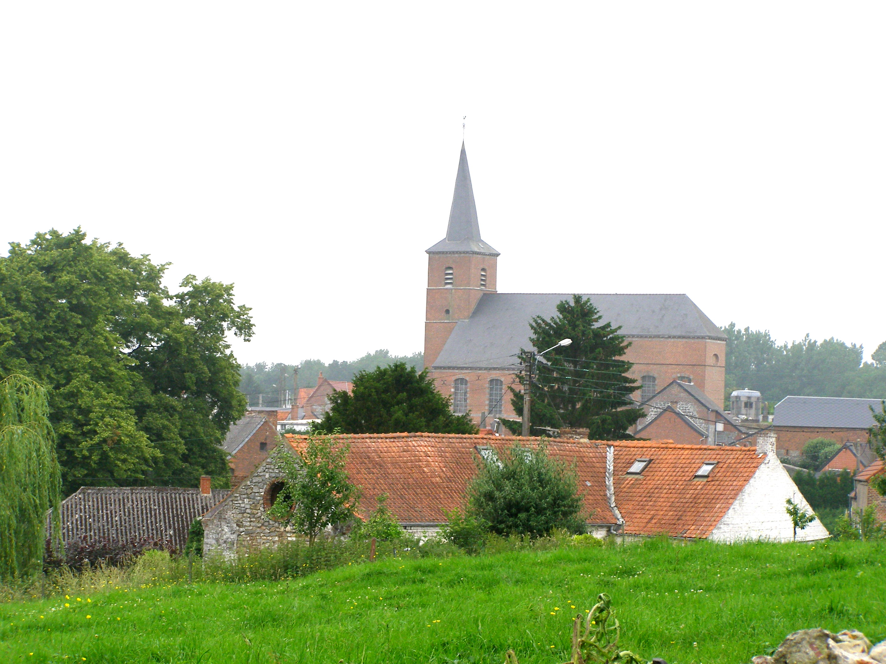 Vue du village.